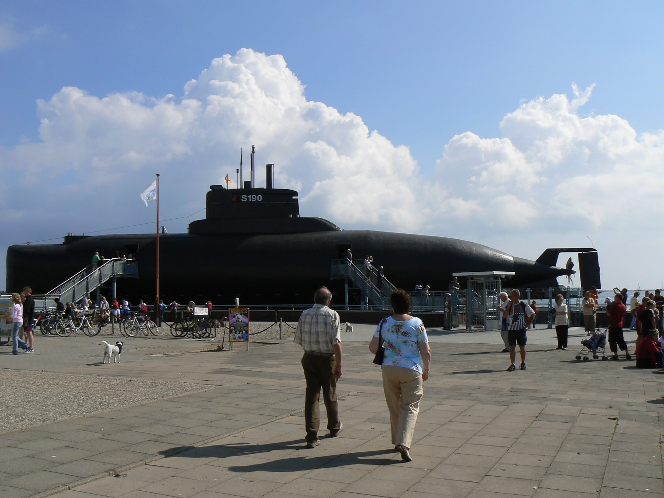 U-Boot S190 vor dem U-Boot-Museum in Burgstaaken auf Fehmarn.